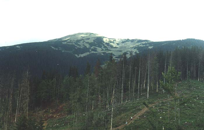 санітарні рубки